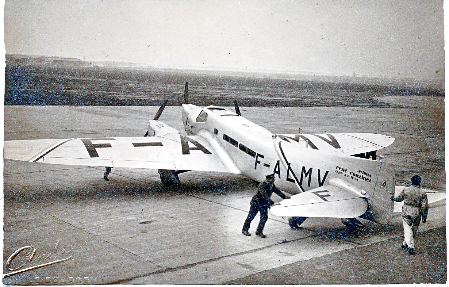 Biarritz vu de haut, le Bourget, avril 1932 Couzinet 33